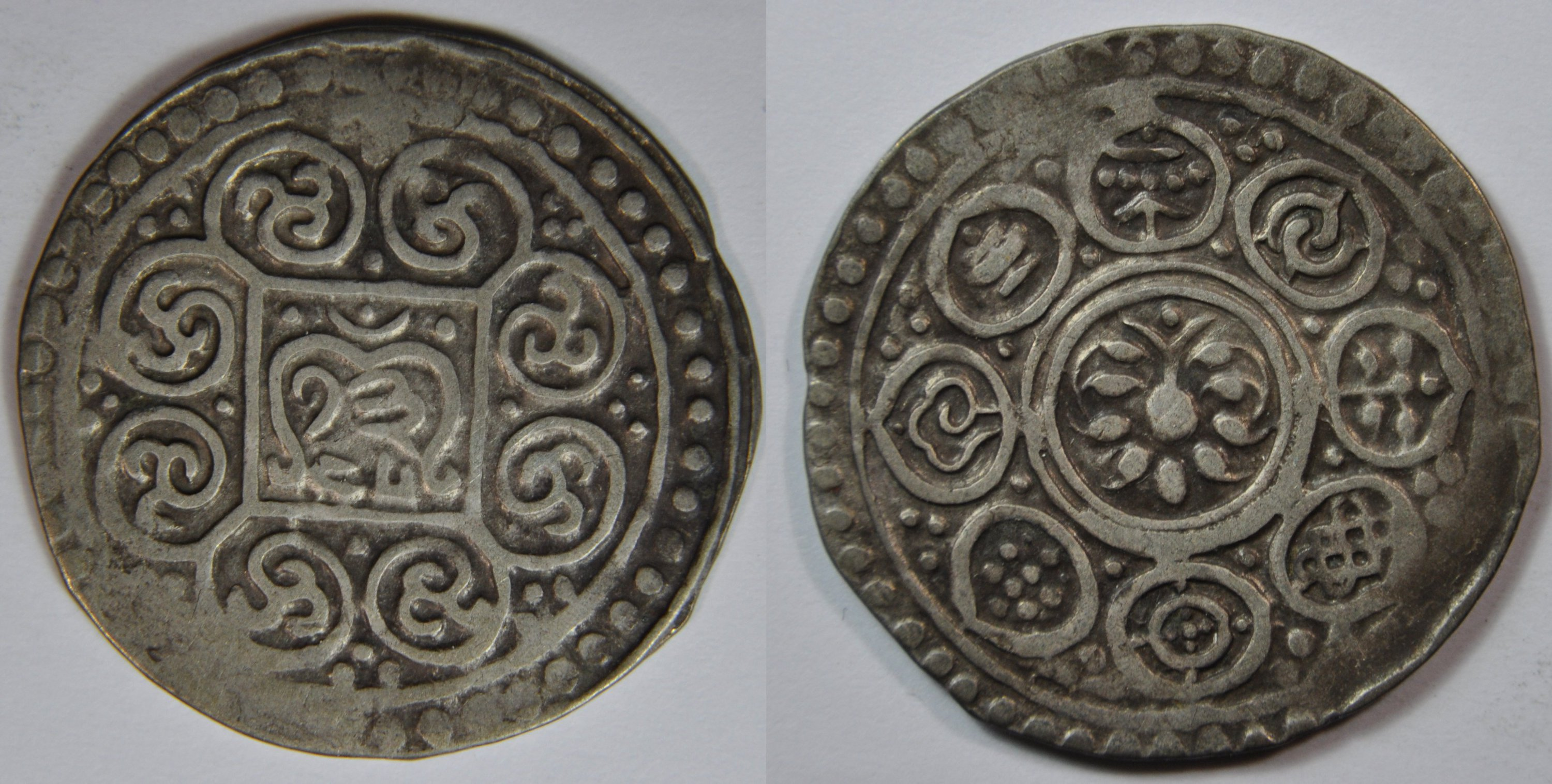 Une monnaie d'un kong-par tangka en argent du Tibet, année 13-45 c'est à dire 1791. A/ Au centre, date R/ Double cercle autour du lotus, symboles bouddhistes. Poids : 4,65 g. Dimensions : 27 mm Référence : C60.